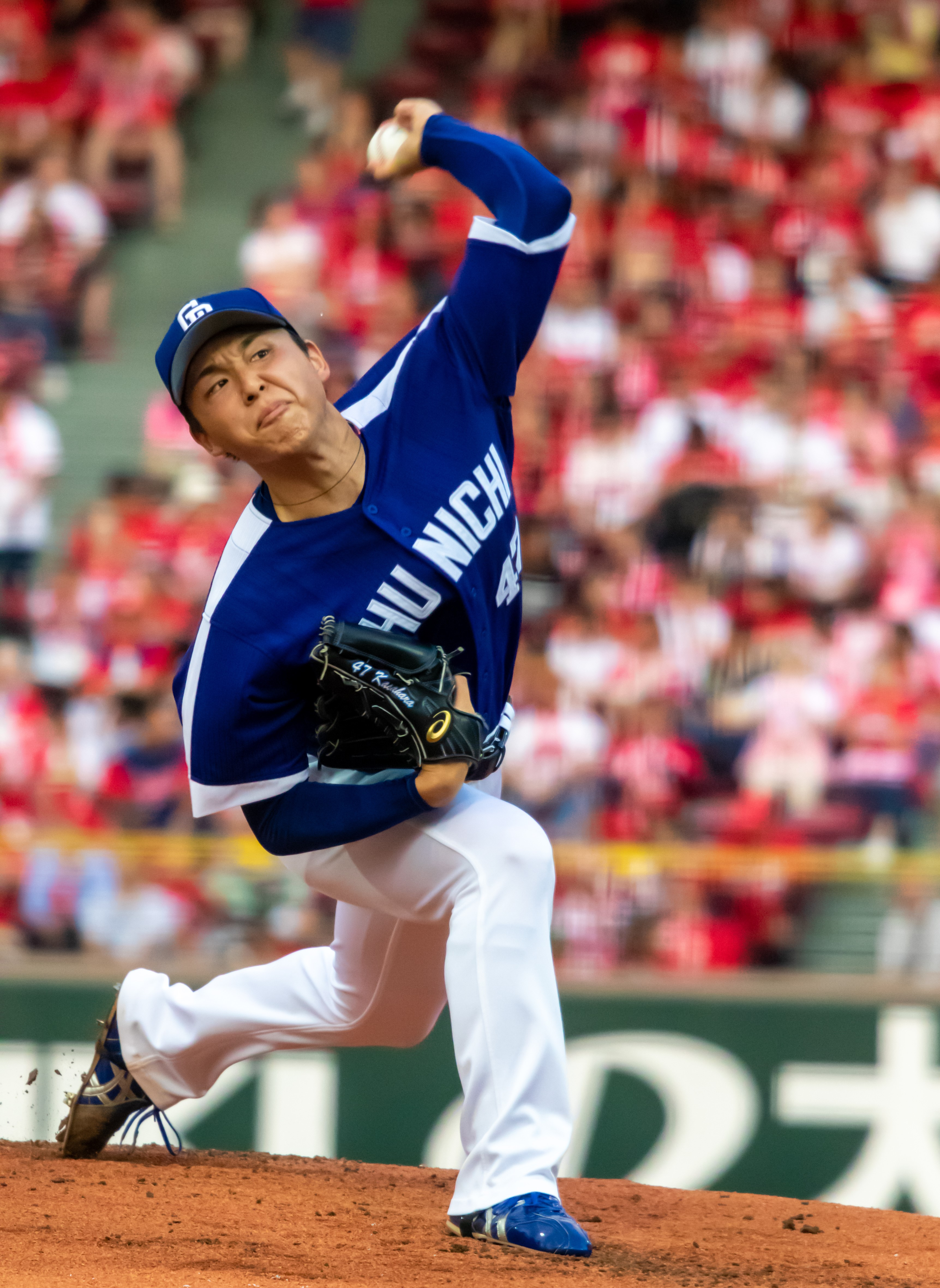 2018/8/24 マツダスタジアム